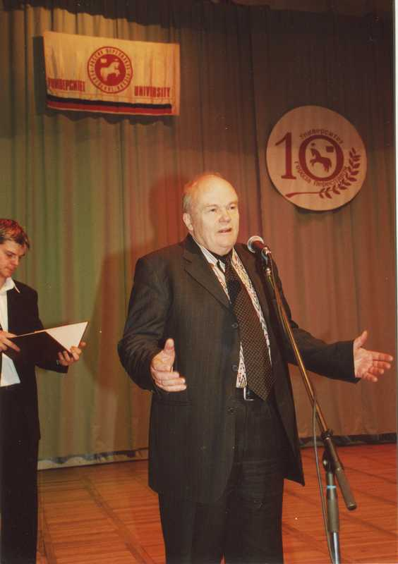 Евгений Павлович Велихов, академик РАН, на празднике 10-летнего юбилея Университета города Переславля в культурном центре «Славич».